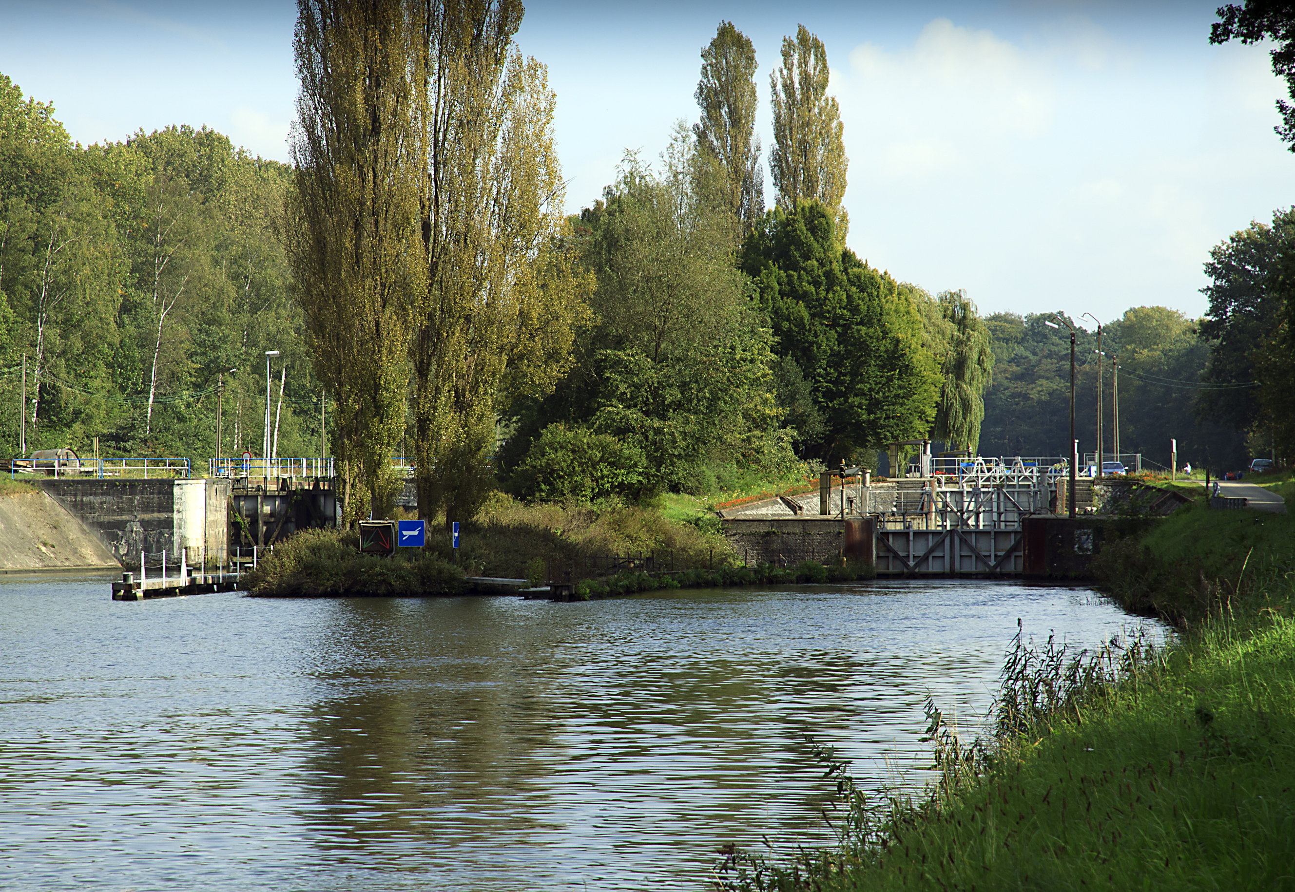 Dubbelsluis 'Sas 2' te Mol in de provincie Antwerpen.